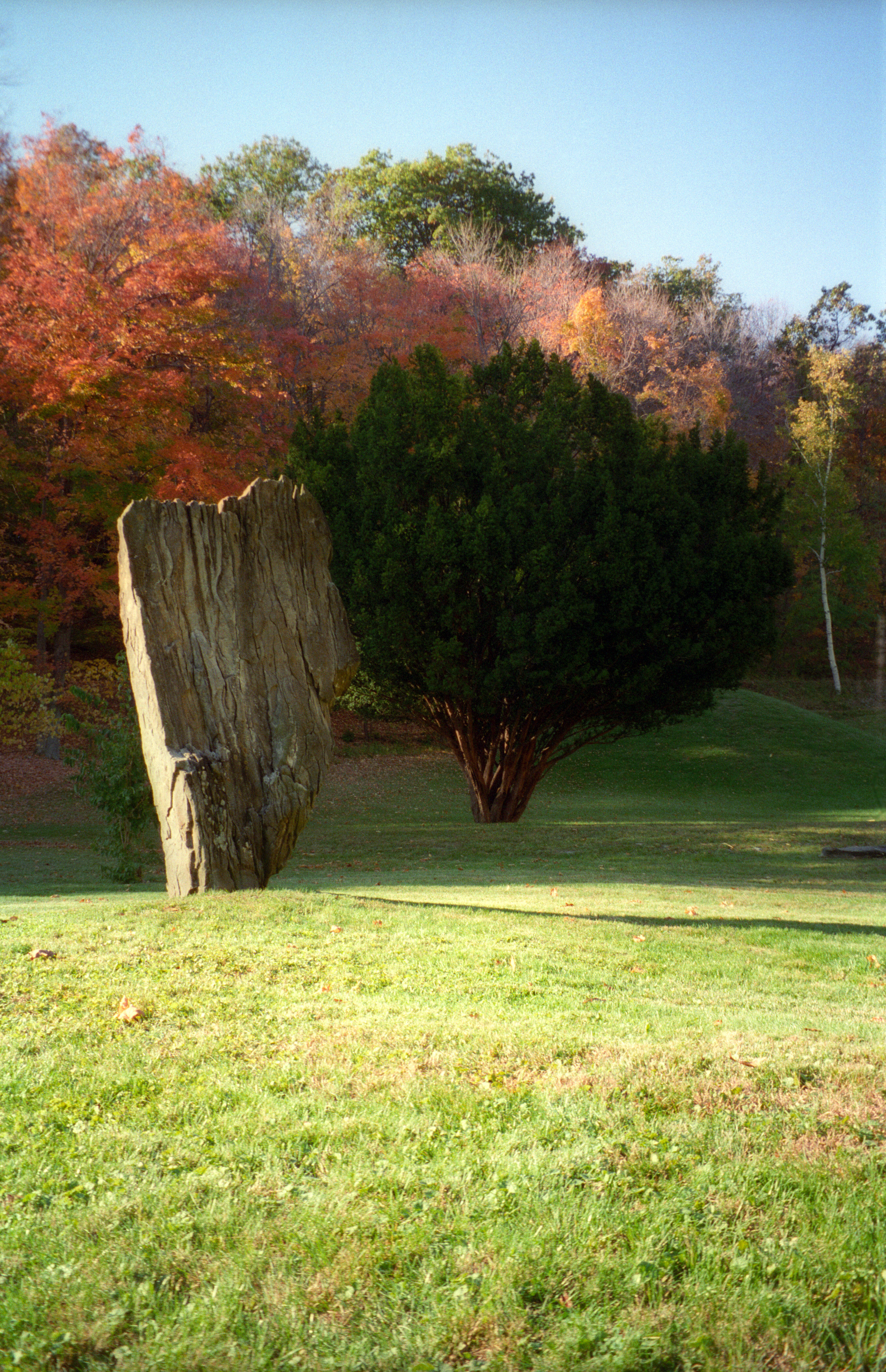 Innisfree Garden in Millbrook, New York.